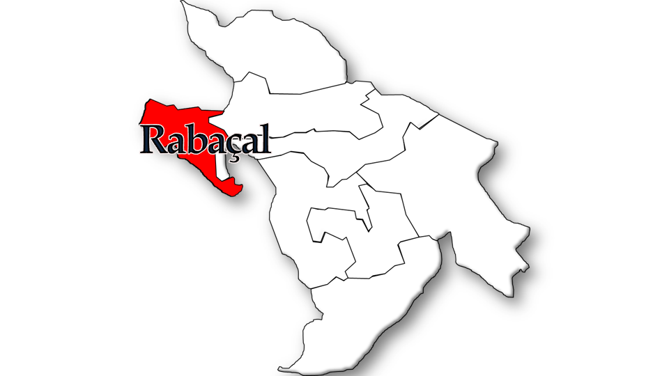 População